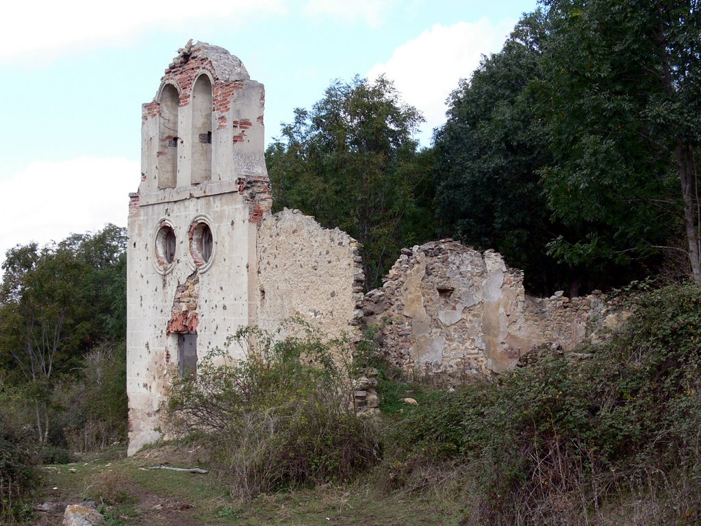 Ruinas de la iglesia de la Asunción en Anguta, despoblado de Valgañón (La Rioja, España)